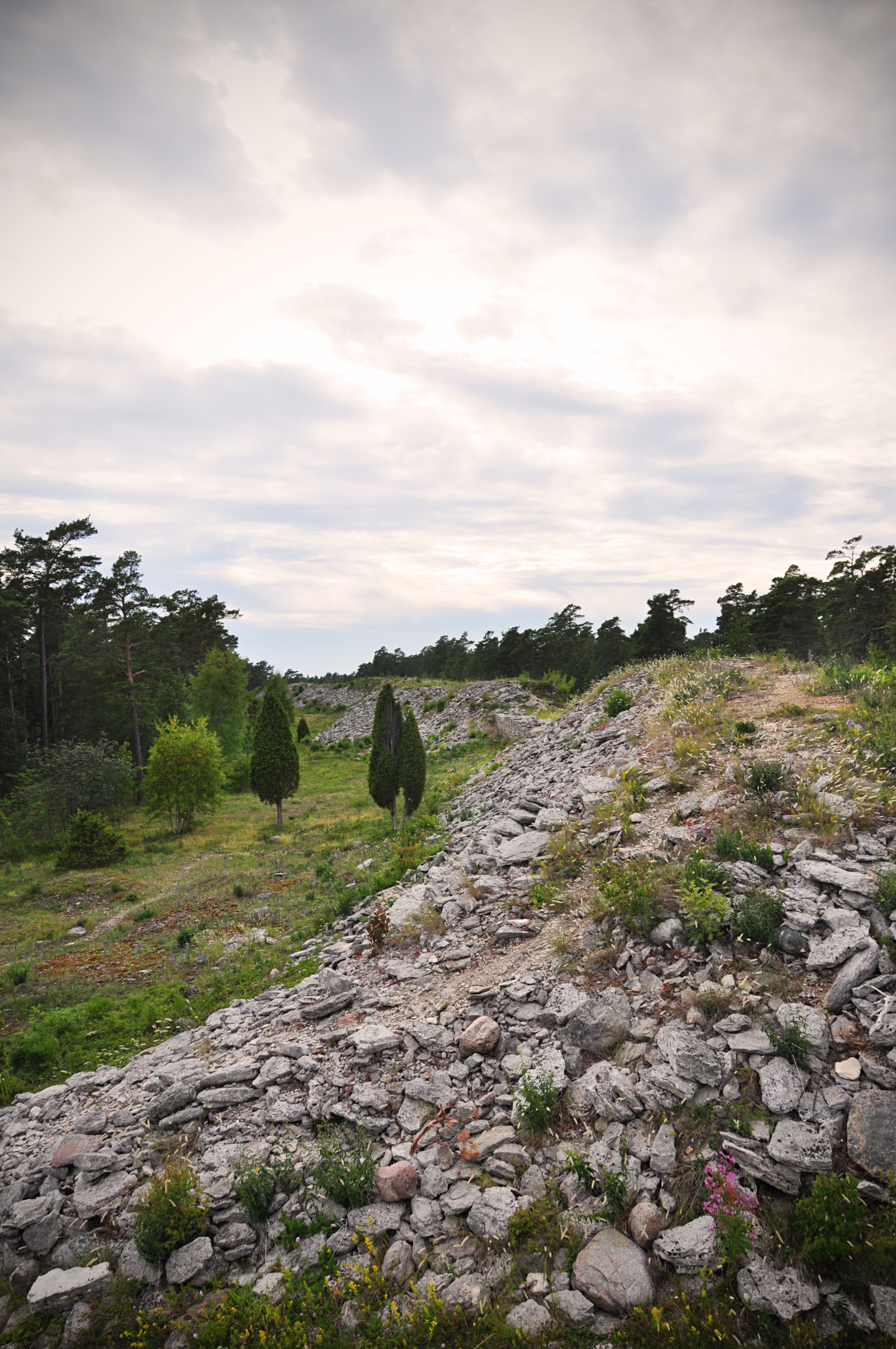 Torsburgen fornborg, Gotland. RAÄ-nummer Kräklingbo 53:1.